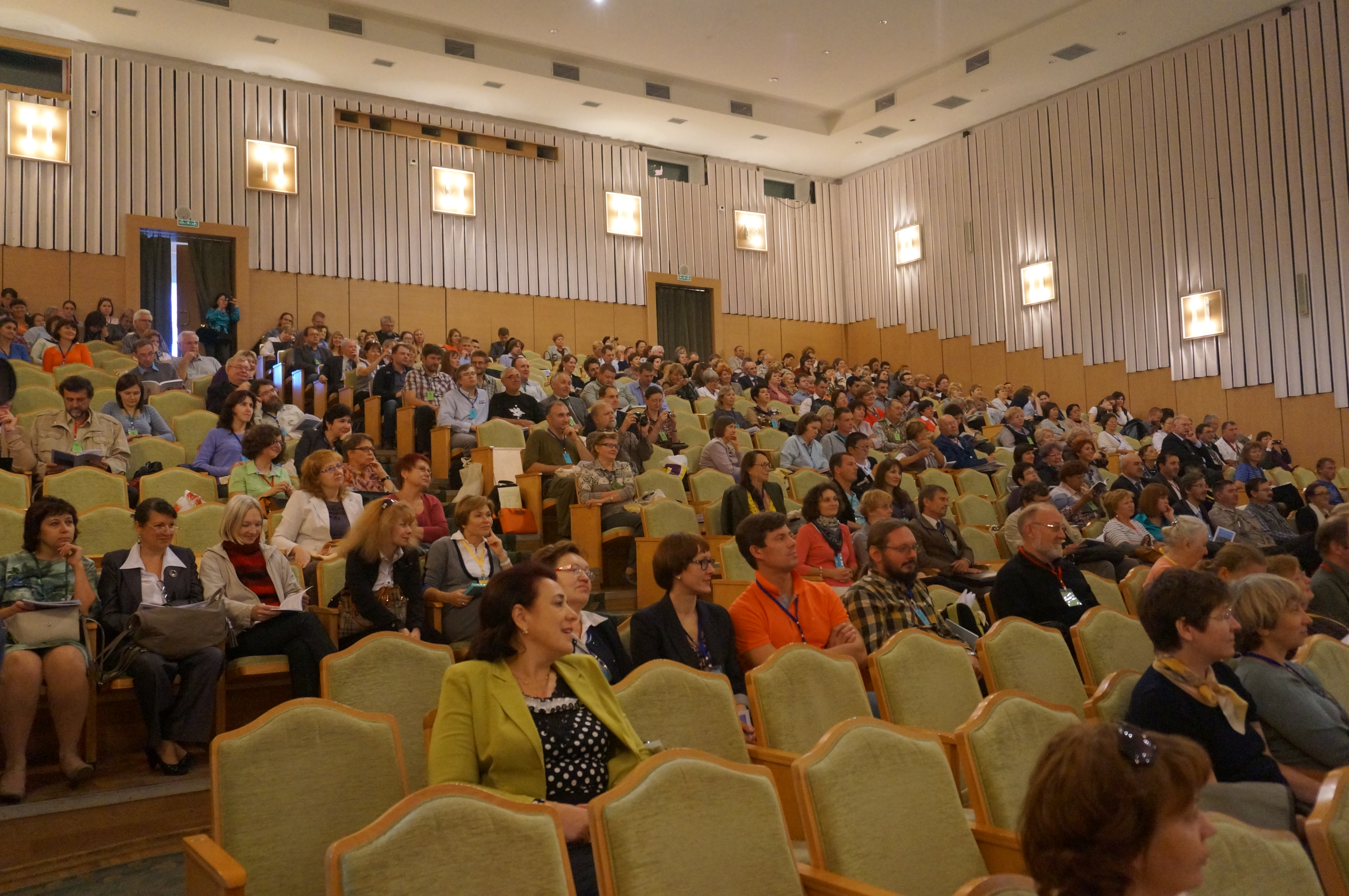 Участники XIII съезда Русского ботанического общества. Тольятти, 2013 год.